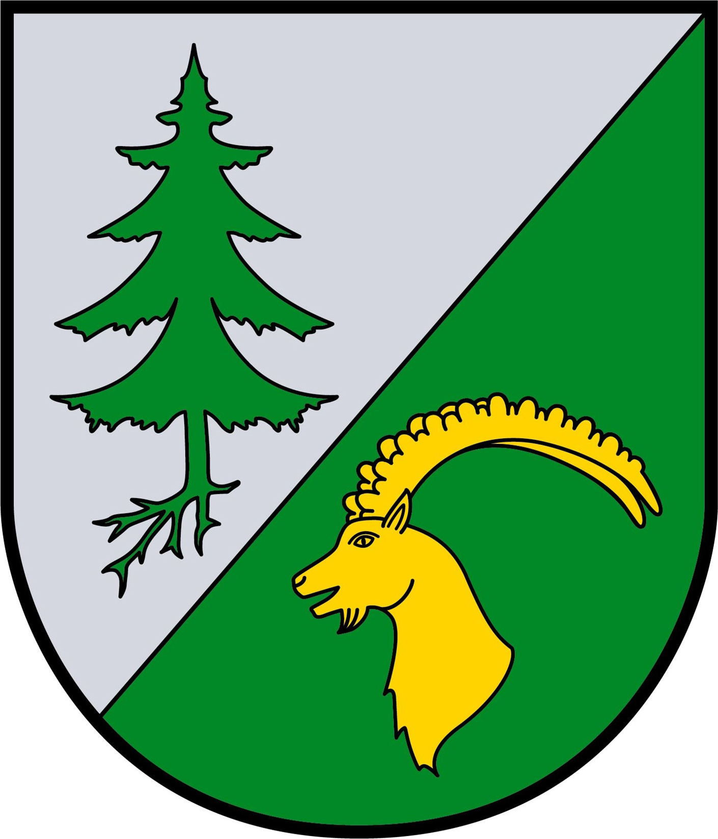 Die Querteilung des Wappenschildes weist eine Ähnlichkeit mit dem Tulwitzer Wappen auf, als neues Wappentier wurde ein goldener Steinbock auf grünem Grund gewählt, dazu ein grüner Nadelbaum auf silbernem Grund. (Quelle: Fladnitzer Nachrichten April 2018, Gemeindezeitung von Fladnitz an der Teichalm)